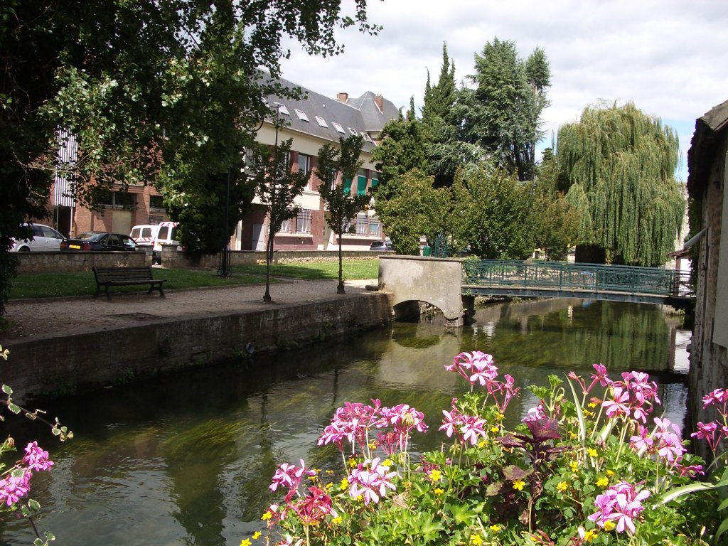 Promenade au bord de l'Eure, le long de la rue de l'Île - la Poste en arrière-plan - Louviers - Eure